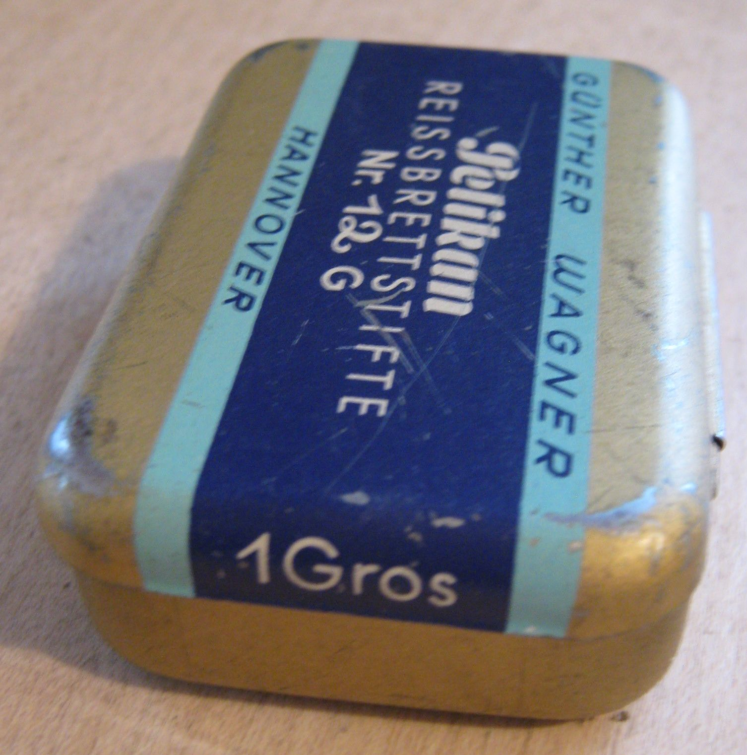 Eine Reissbrettstifte-Dose der Fa. Pelikan, Metall, mit der Mengenbezeichnung „1 Gros“